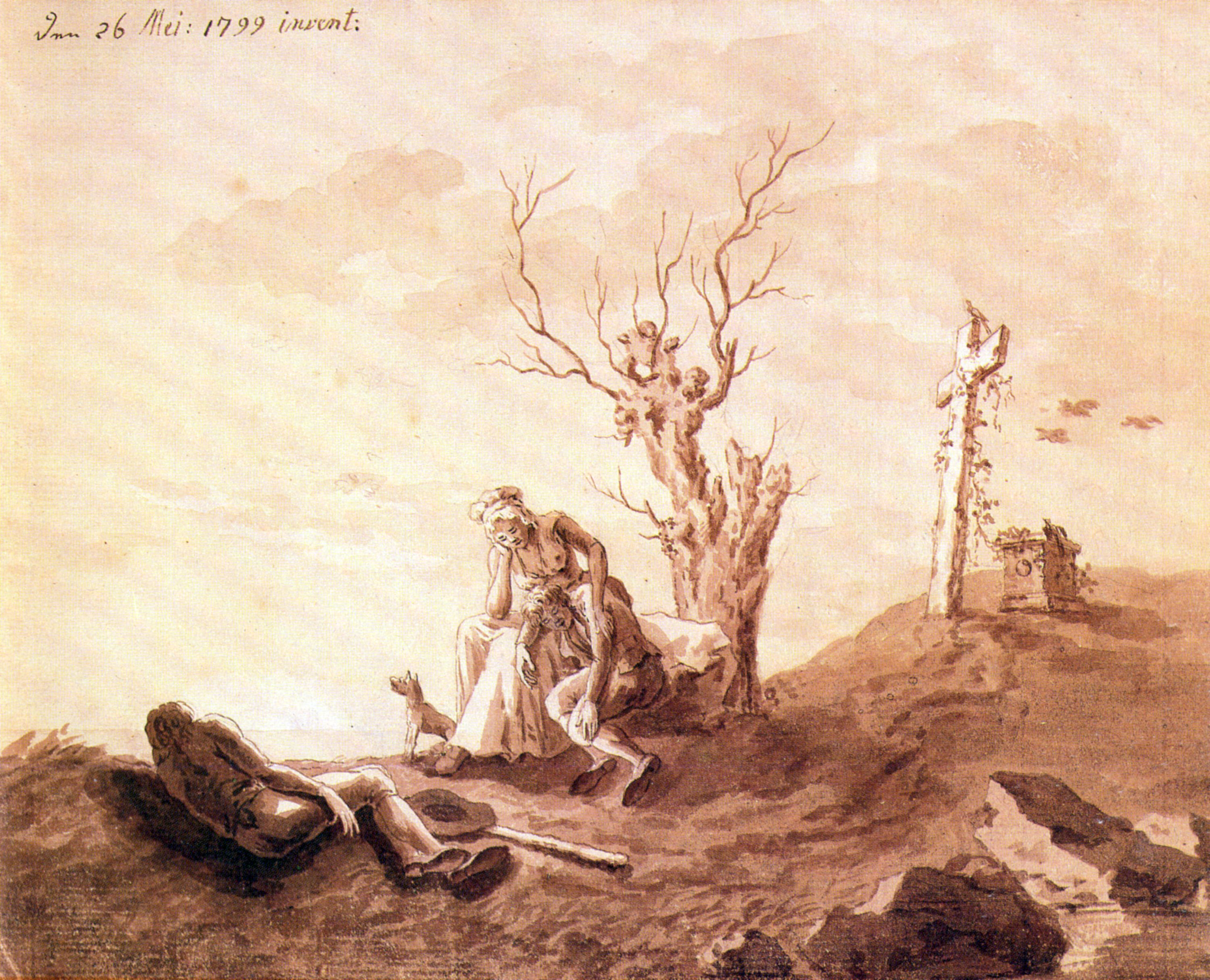 Trauerszene am Strand